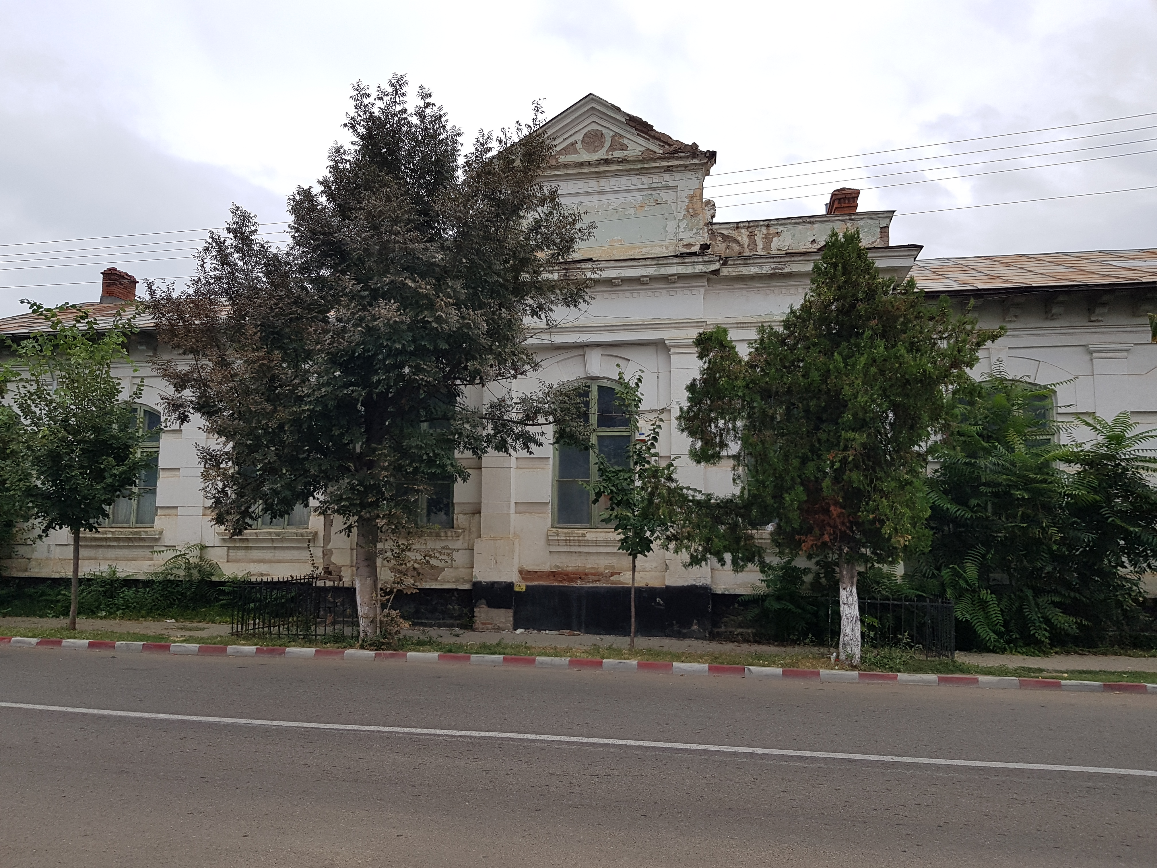 Școală cu două corpuri